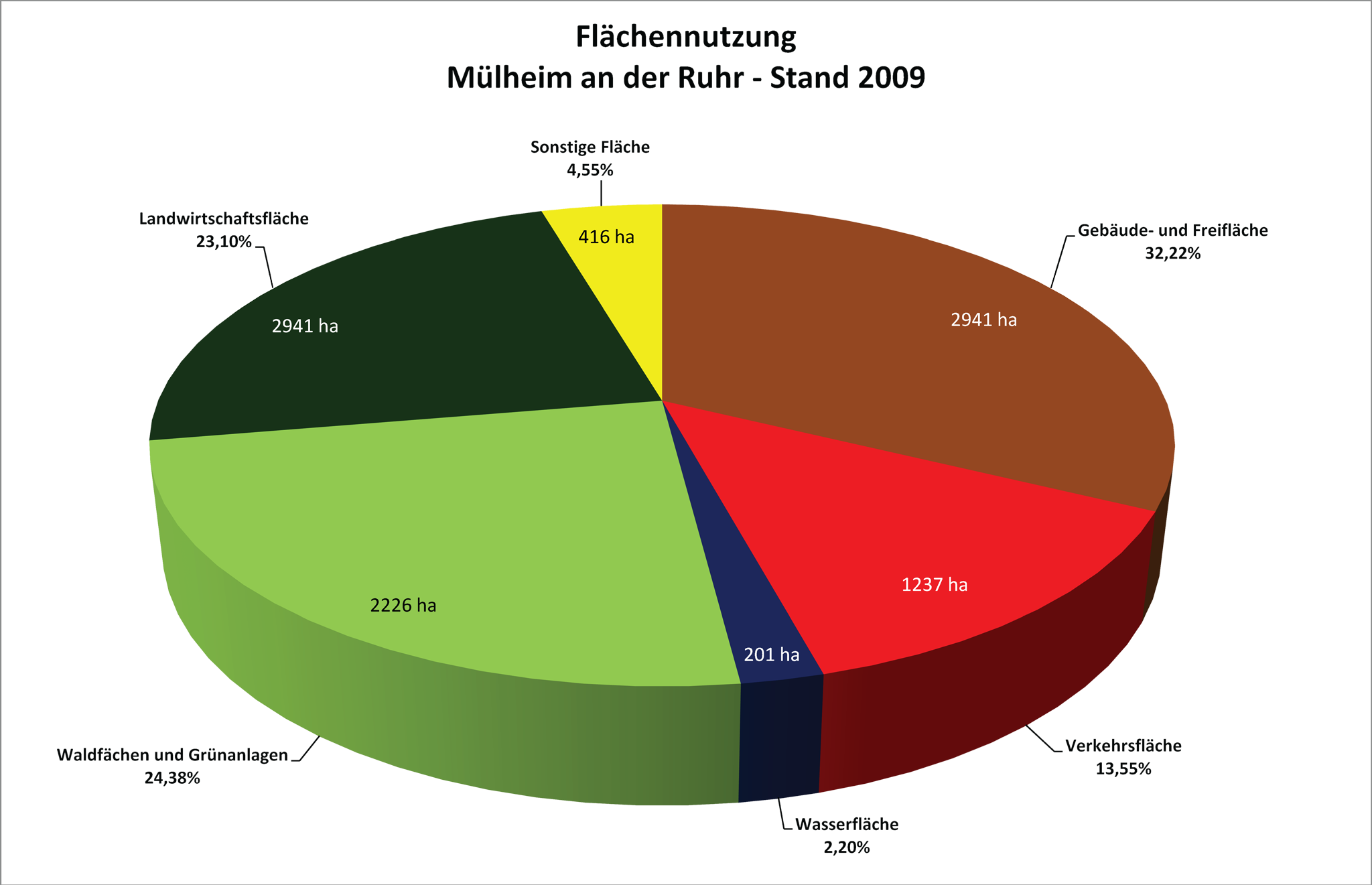 Visualisierung Flächennutzung Mülheim an der Ruhr (Stand: 2009) Hinweis: Grünanlagen enthalten nicht die Friedhofsflächen, diese sind in den Sonstigen Flächen enthalten, sondern nur ausschließliche Grünanlagen